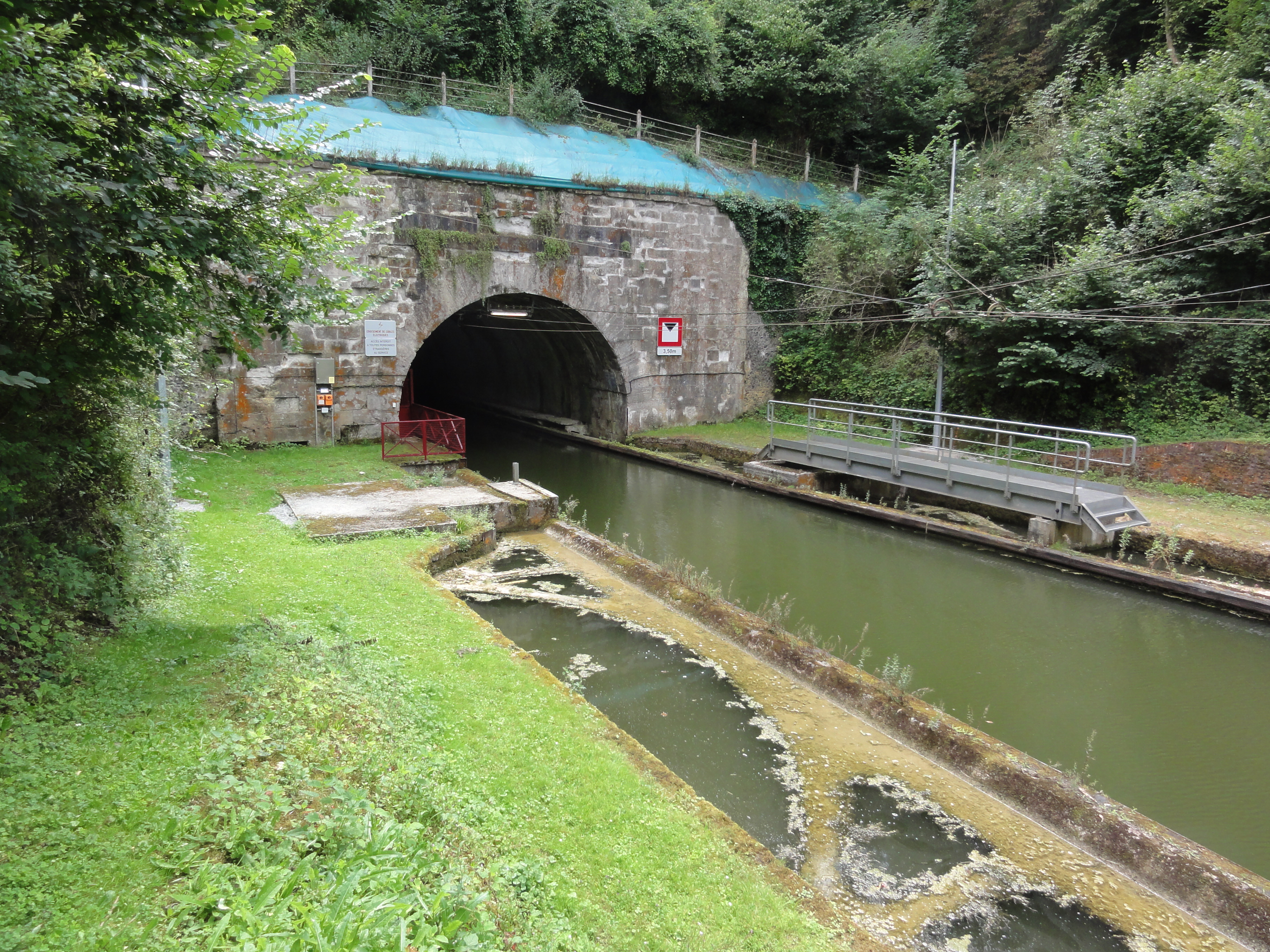 Bony (Aisne), hameau de Macquincourt, Canal de Saint-Quentin, sortie du tunnel de Riqueval, coté Le Catelet